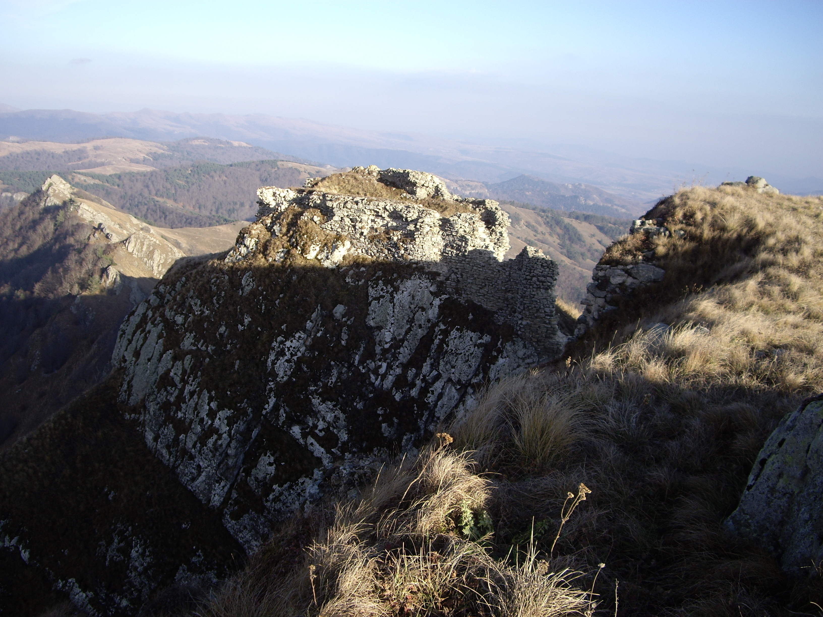 კლდეკარის ციხის ხედი ზემოდან